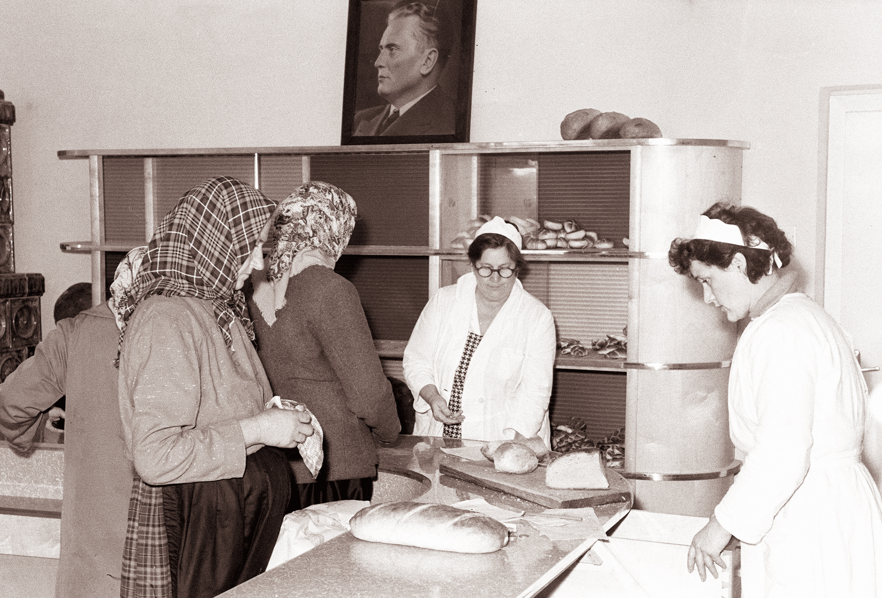 Pekarna v Ormožu.